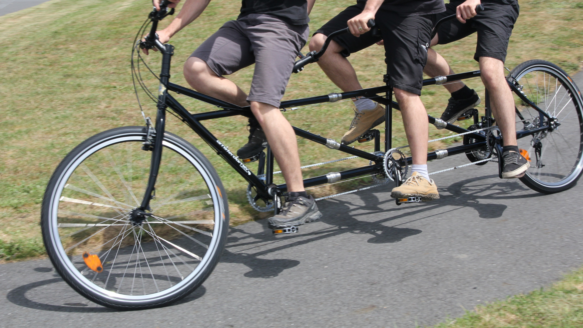 Triplette